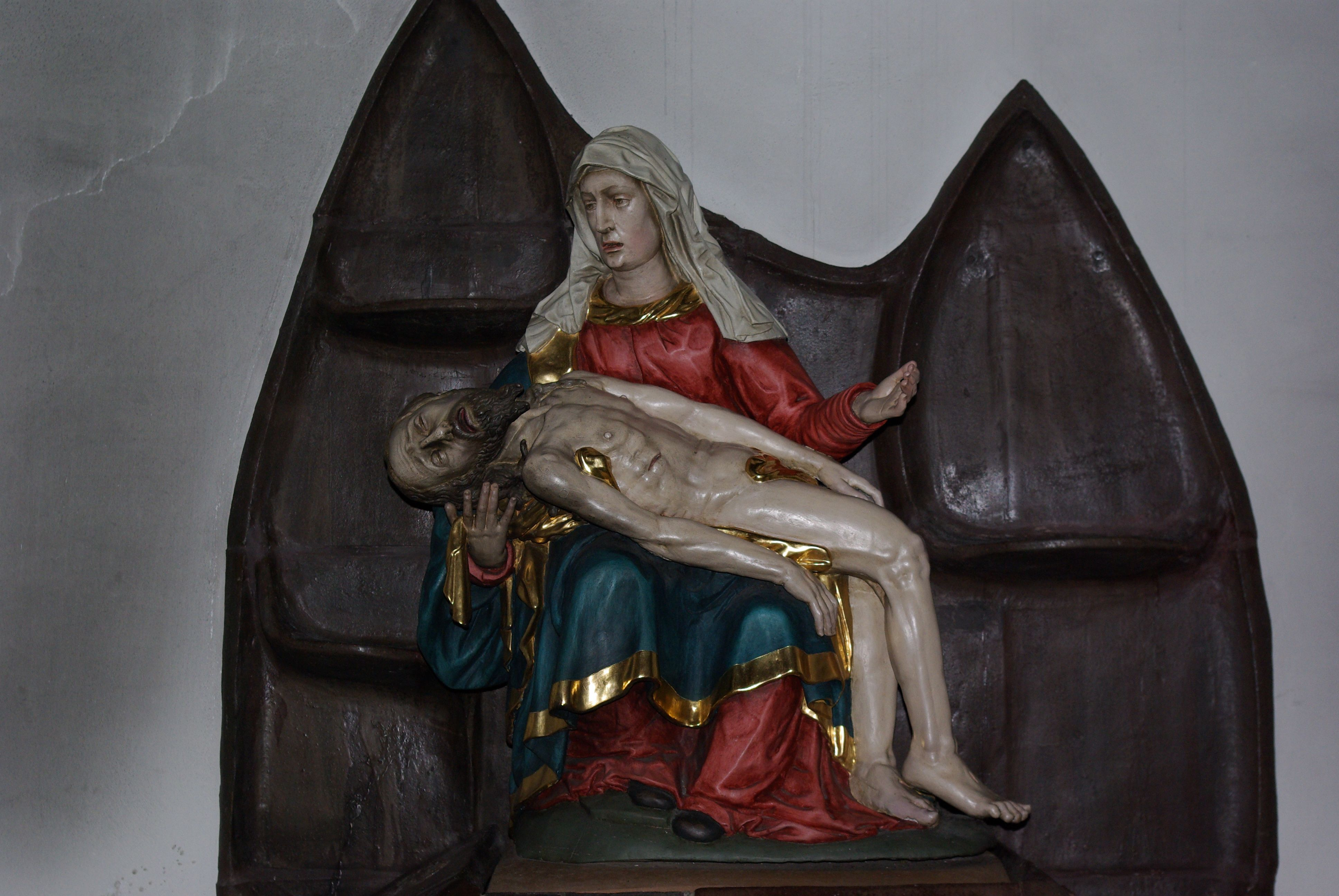 Zwiesel Bayern, In der Stadtkirche St. Nikolaus, die Pieta eines unbekanten Künstlers